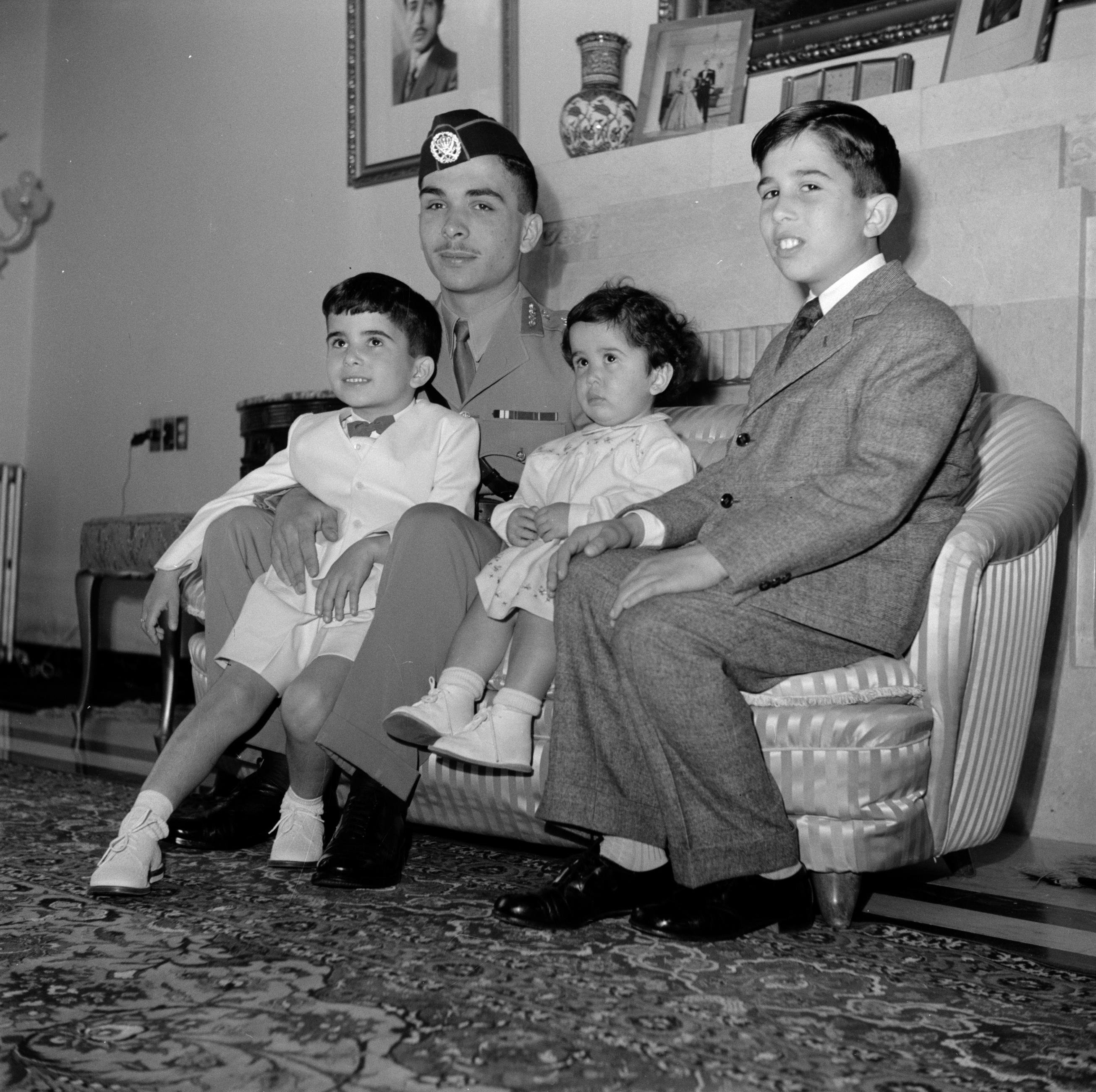 Collectie / Archief : Fotocollectie Van de Poll Reportage / Serie : Midden-Oosten 1950-1955: Jordanië - Amman Beschrijving : Koning Hussein met jongere familieleden, prins Hassan, prins Mohammad en prinses Basma, in het paleis Datum : 1952 Locatie : Amman, Jordanië Trefwoorden : familieportretten, koningen, paleizen, prinsen, prinsessen Persoonsnaam : Basma, prinses, Hassan, prins, Hussein, koning van Jordanië, Mohammad, prins Fotograaf : Poll, Willem van de Auteursrechthebbende : Nationaal Archief Materiaalsoort : Negatief (zwart/wit) Nummer archiefinventaris : bekijk toegang 2.24.14.02 Bestanddeelnummer : 255-5064 Reacties Geplaatst door Anoniem op 04 juli 2014 - 11:05. De datum van deze serie kan niet kloppen. Prinses Basma bint Talal werd op 11 mei 1951 geboren, en zij is op deze foto naar ik inschat 1 jaar oud. Dus 1952 ligt meer voor de hand. Geplaatst door Anoniem op 04 juli 2014 - 16:38. Trouwens, als de omschrijving Koning Hussein klopt, dan moet het zeker in 1952 zijn want hij werd pas in 1952 koning.